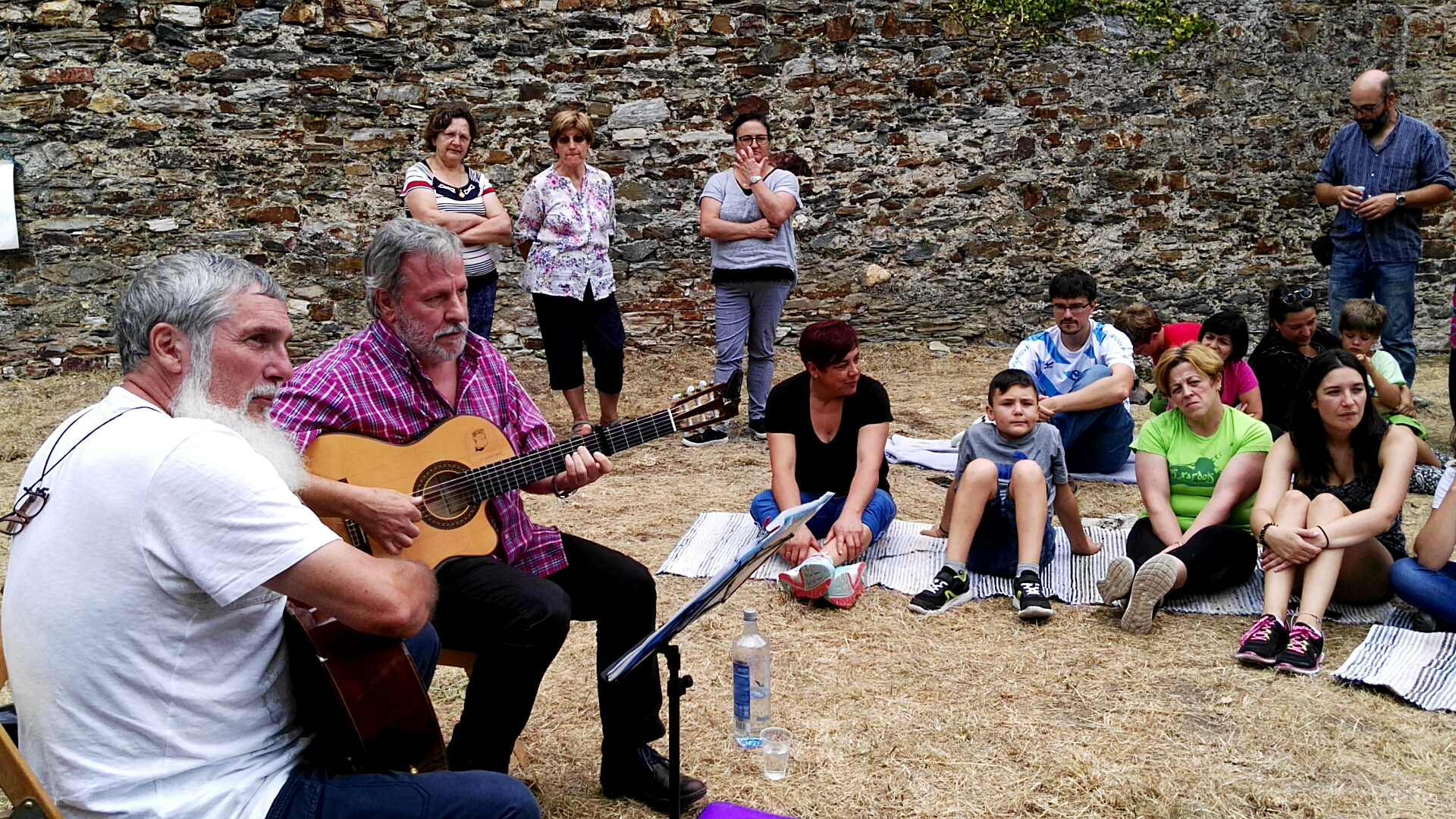 Mini e Mero en un concert realitzat al castell de Doiras per la "Festa da involución educativa" l'agost de 2017.